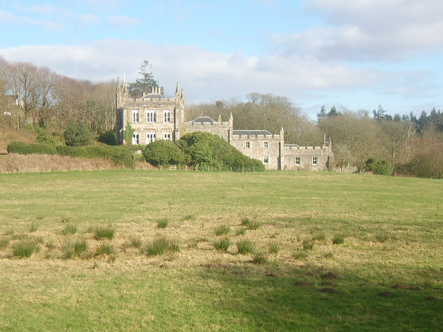 Glenbarr Abbey, Kintyre, Scotland